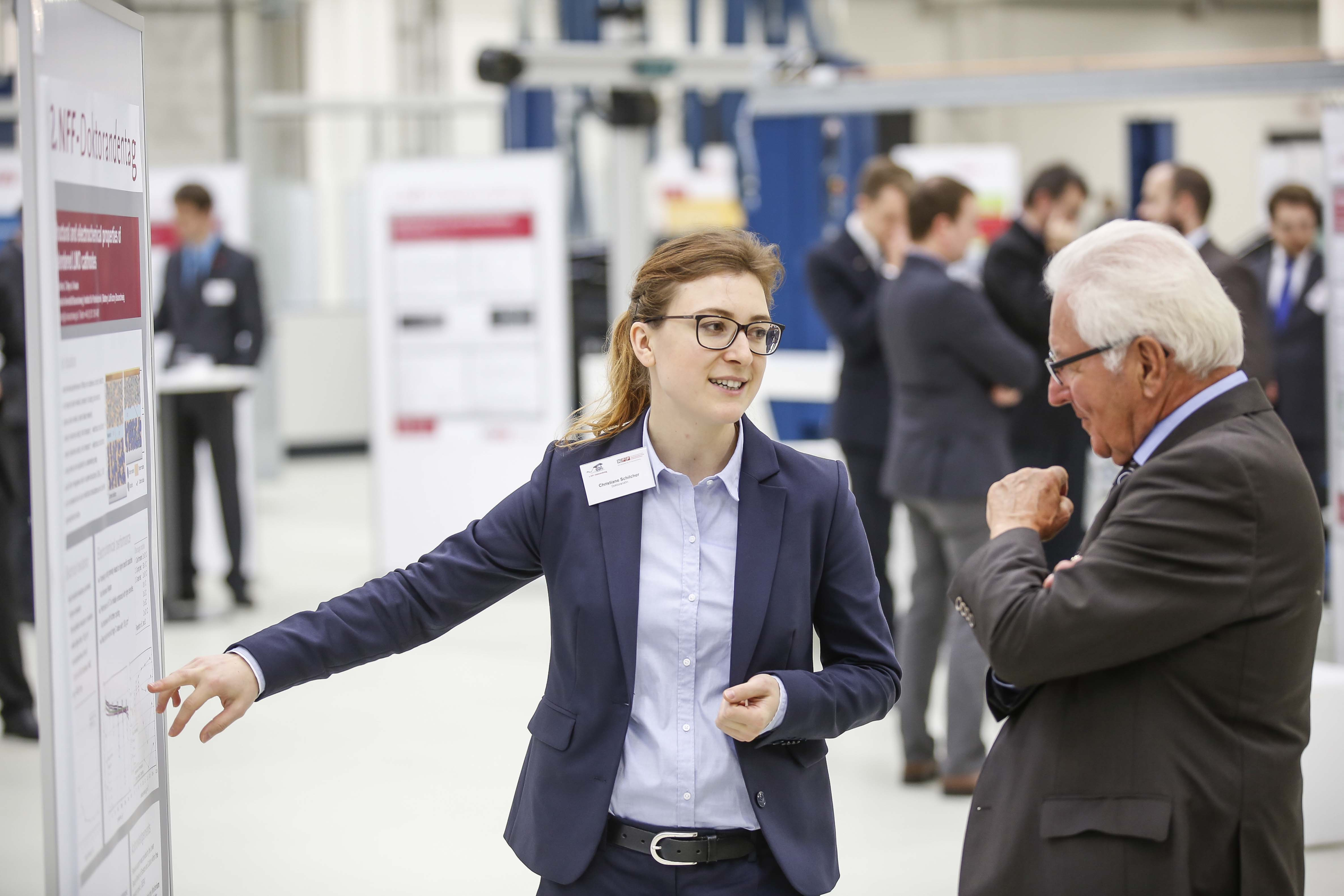 2. NFF-Doktorandentag